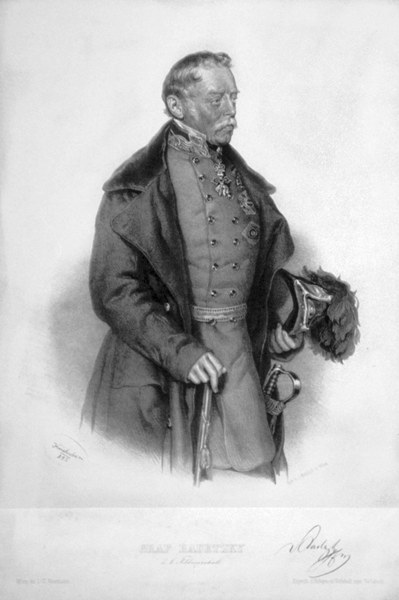 Josef Graf Radetzky (1766-1858), k. k. Feldmarschall. Lithographie von Josef Kriehuber, 1852